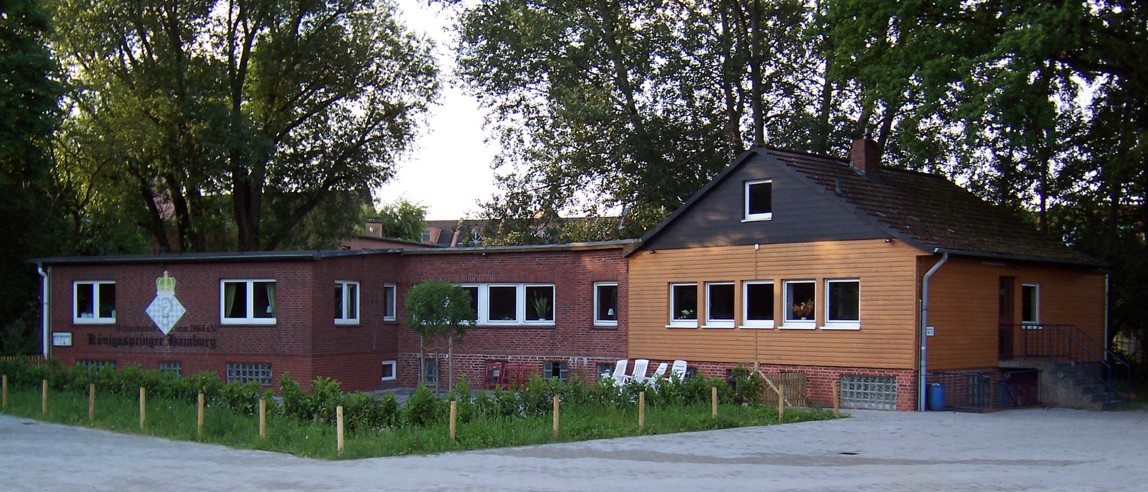 Königsspringer Hamburg, Clubheim, Auflösung 1148*492